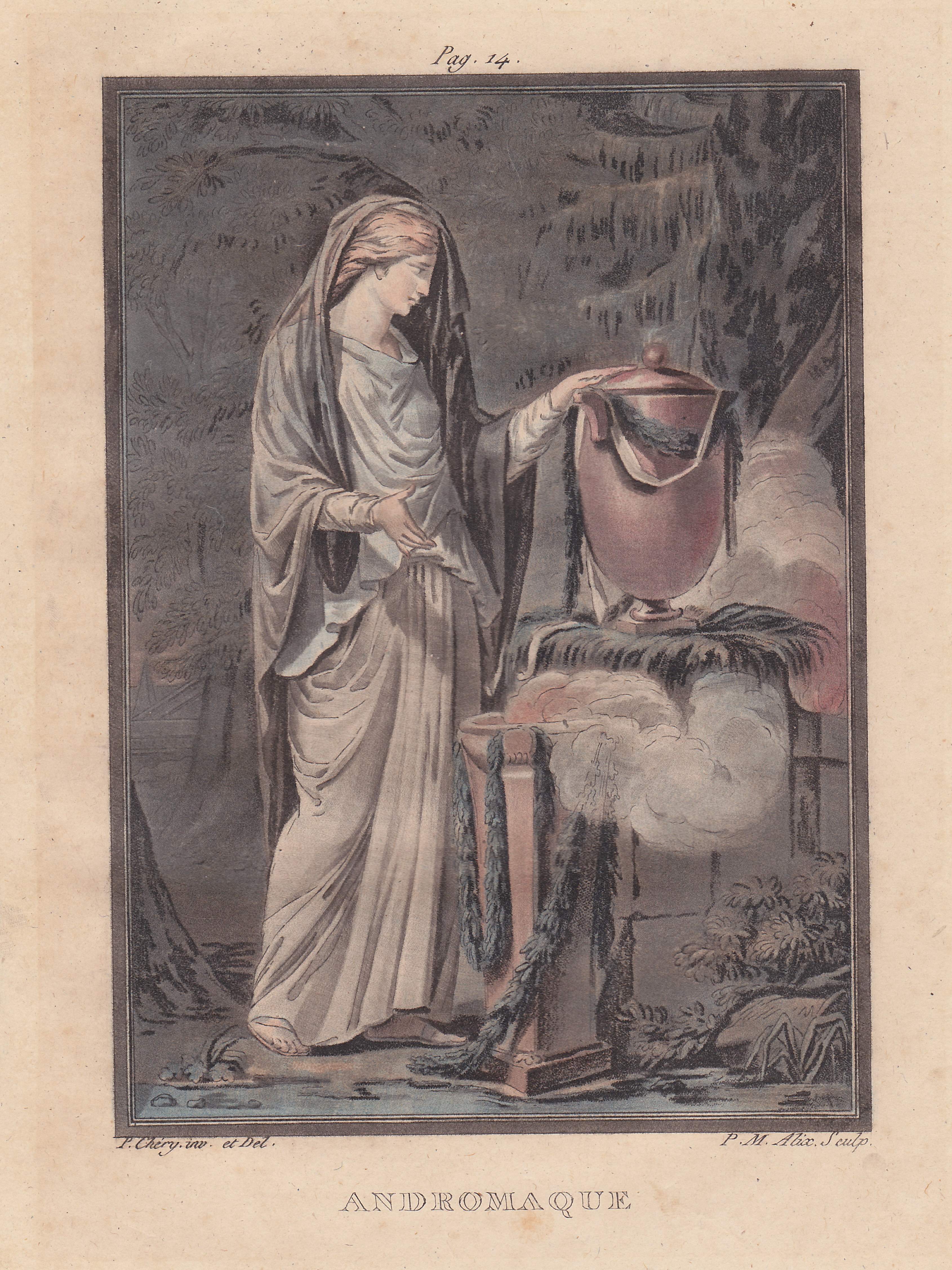 Andromache an der Urne Hektors trauernd,farbige Aquatinta von Pierre-Michel Alix, 1790.